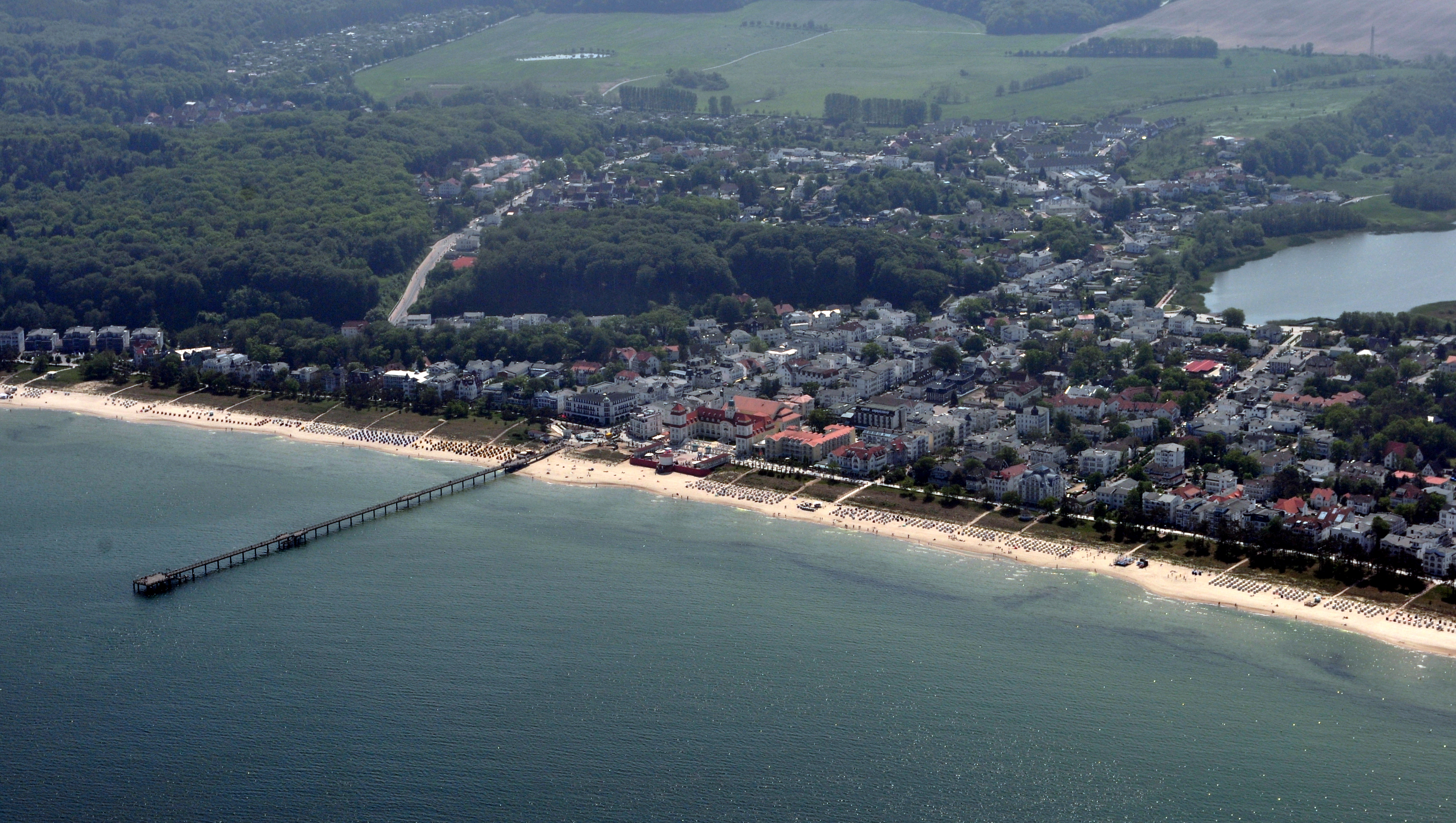 Die Bilder wurden von mir während eines einstündigen Rundflugs ab Flugplatz Güttin am 21. Mai 2011 aufgenommen. Die Bildbeschreibung steht im Dateinamen. Aufgenommen mit einer Nikon D5000 durch das Seitenfenster des Flugzeugs.